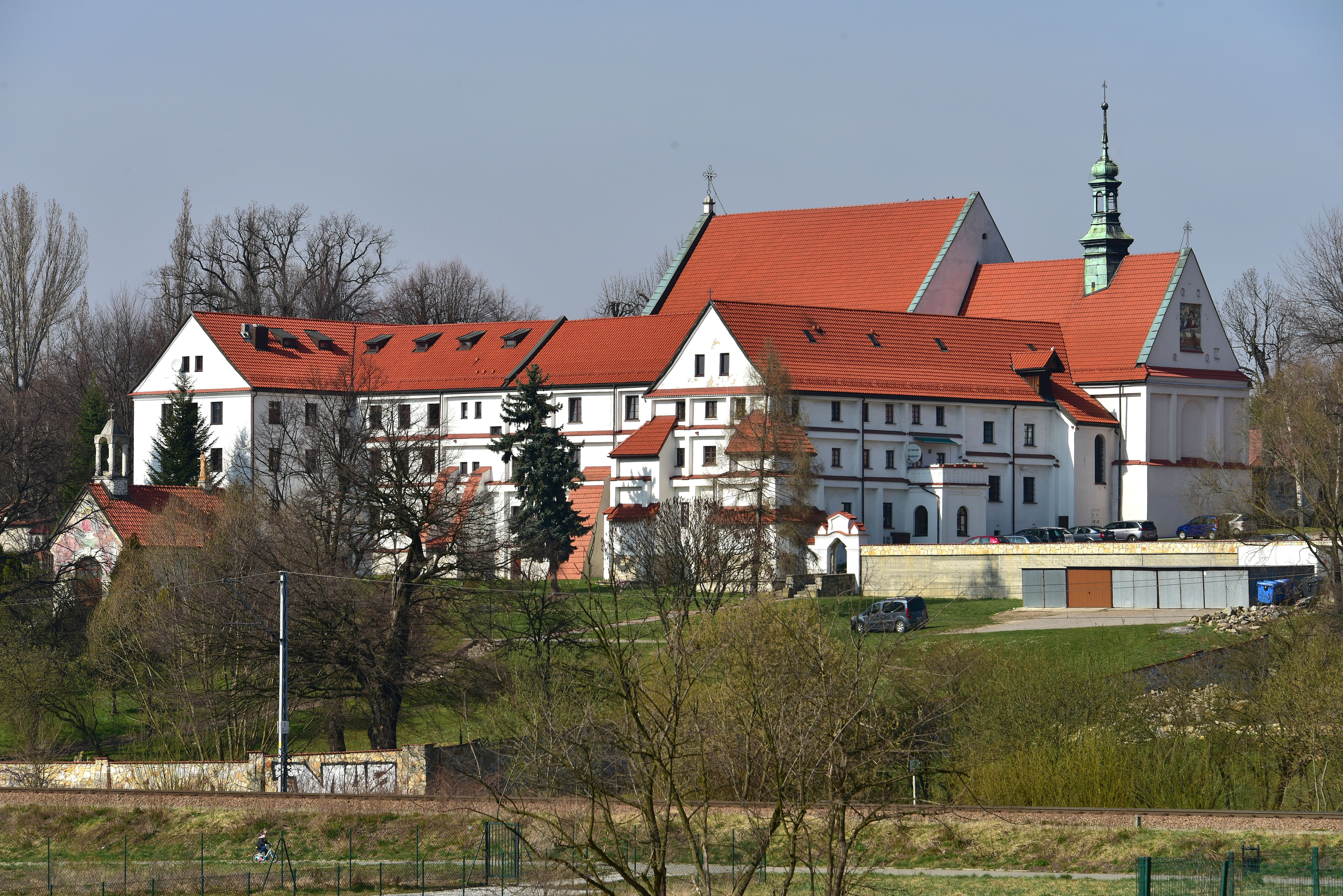 Klasztor franciszkanów reformatów w Wieliczce